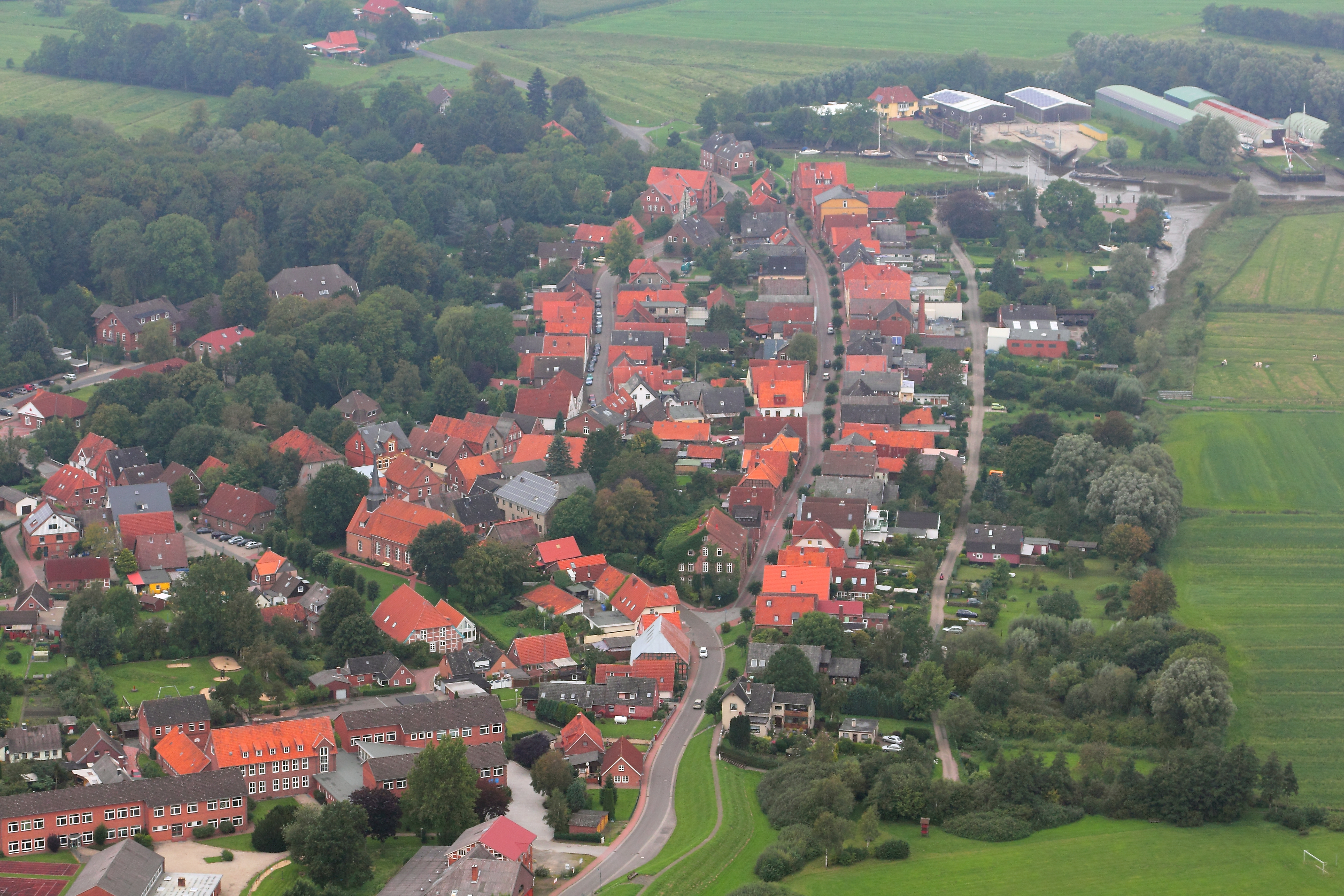 Historischer Ortskern von Neuhaus (Oste) Dieses Foto entstand aufgrund eines Projektes, das von Wikimedia Deutschland e. V. gefördert wurde. Im Rahmen des „Community-Projektbudgets“ sollen Luftbilder u.a. von Inseln, Halligen, Sanden und Küstenstädten der deutschen Nordseeküste angefertigt werden. Das Projekt „Fotoflüge“ wurde im September 2011 begonnen.